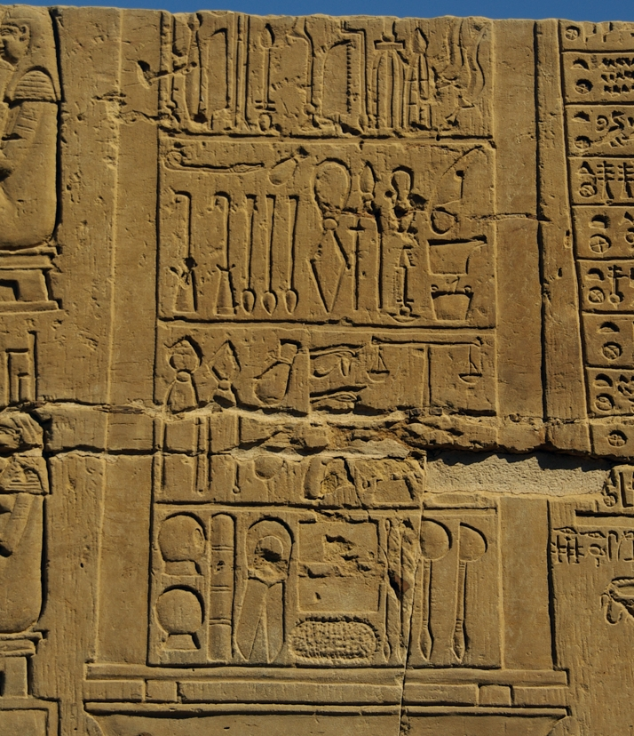 Instruments chirurgicaux-Bas reliefs du temple de Kôm Ombo-début du IIe siècle-Ptolémée VI